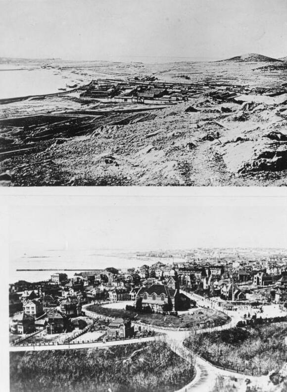 Tsingtau, einst und jetzt (Ansichtsbild) China, Tsingtau Einst und jetzt